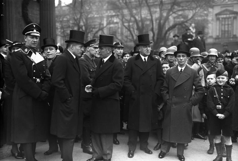 Volkstrauertag in Berlin am 25. Februar 1934. Die Reichsregierung vor dem Ehrenmal Unter den Linden von links nach rechts: Finanzminister Schwerin v. Krosigk, Vizekanzler v. Papen, Außenminister v. Neurath, Dr. Goebbels.